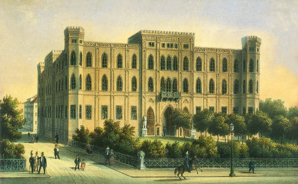 München, Wittelsbacher Palais mit Vorgarten